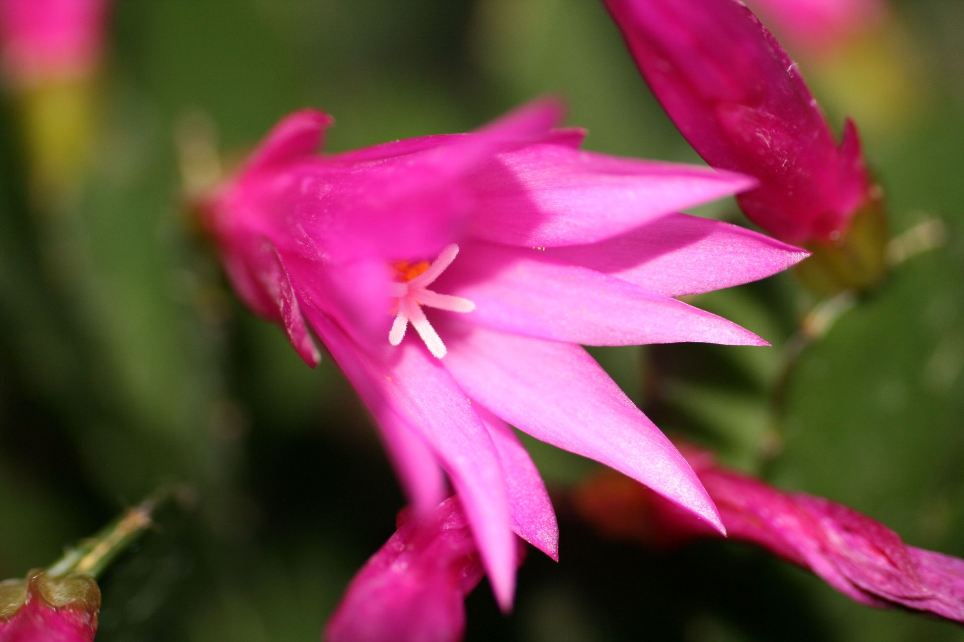 Hatiora X graeseri kaktusz virága